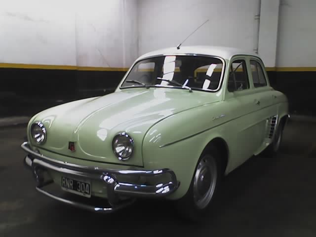 Renault Dauphine fabricado en Argentina donde se aprecian las defensas exigidas por la ley.